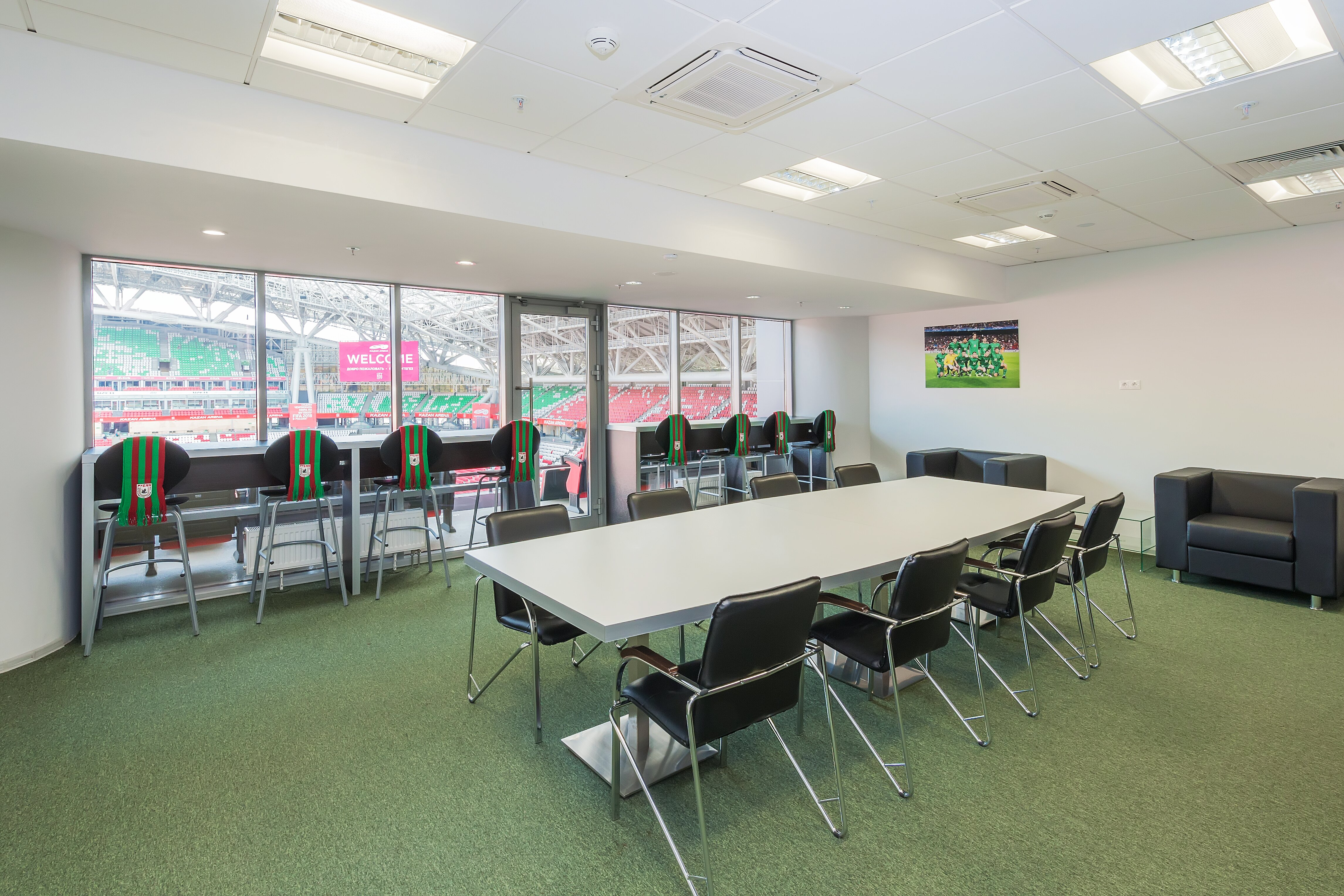 Скайбокс